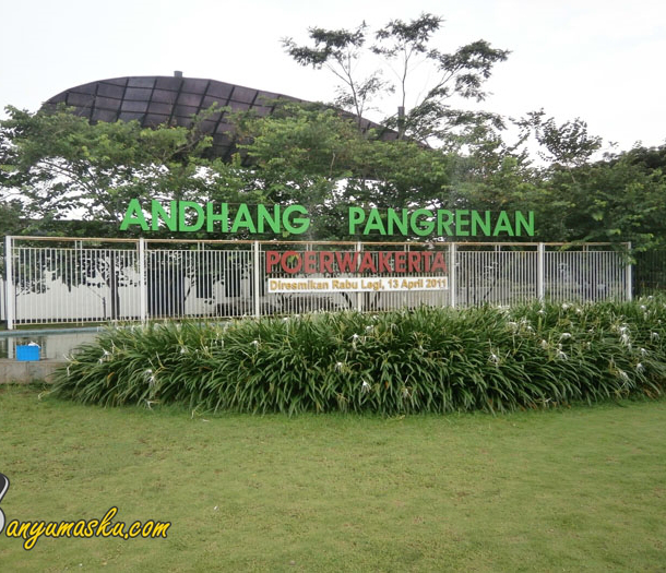 Taman Andhang Pangrenan